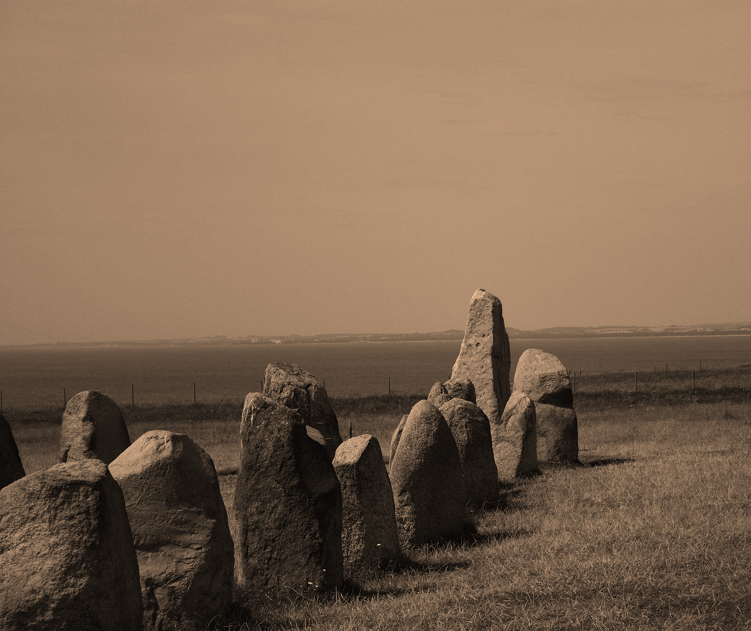 Ales stenar (RAÄ-nr Valleberga 20:1) i Valleberga socken, Ystads kommun, Skåne län, Skåne, Sverige.